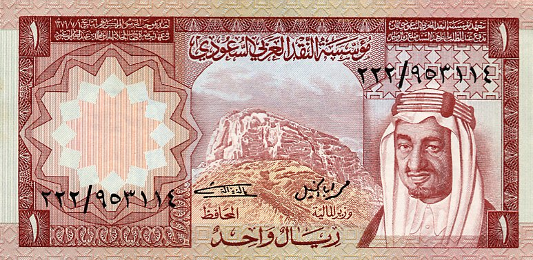 1 риал. Саудовская Аравия, обр. 1977. Аверс.